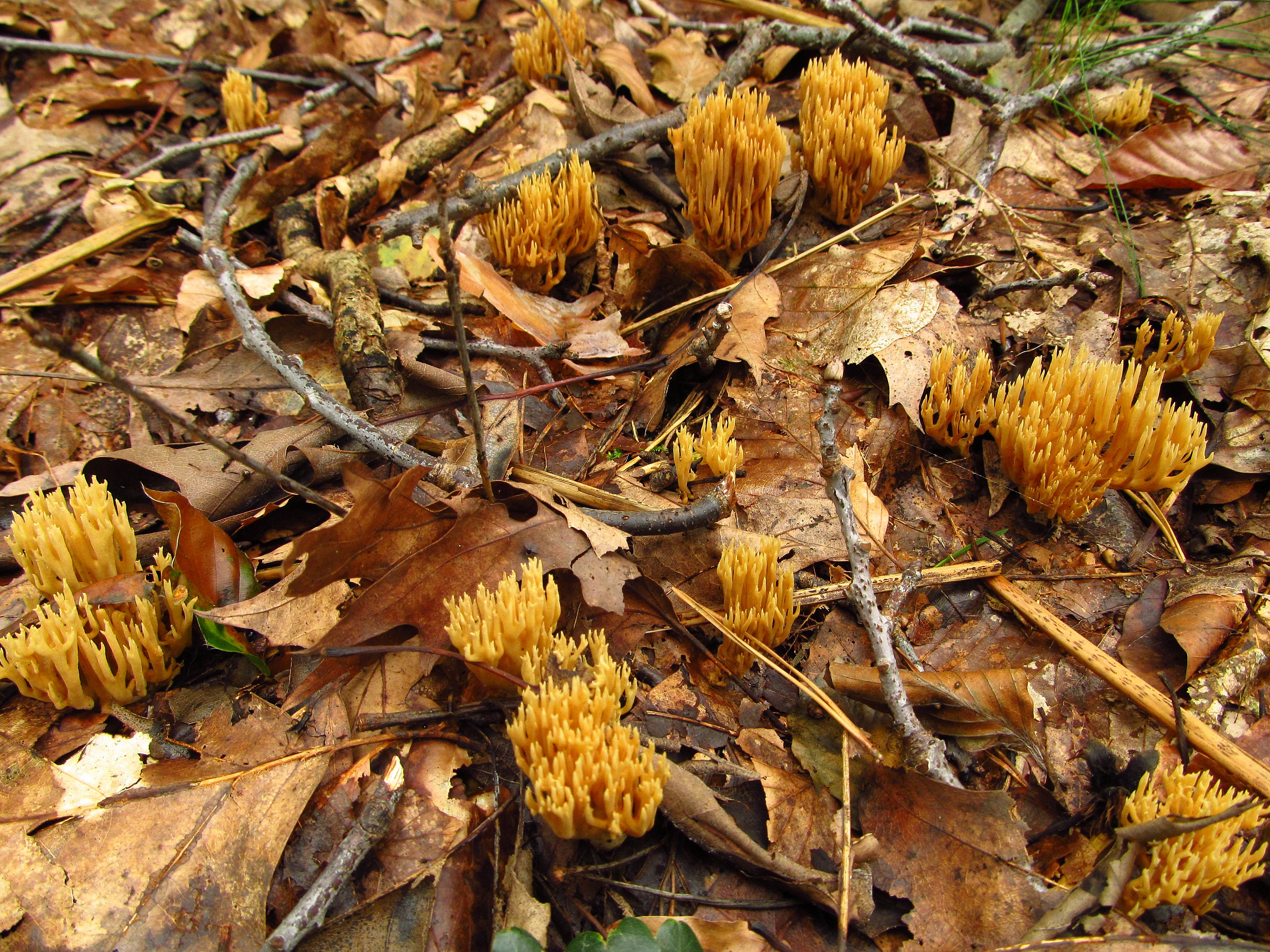 Steife Koralle (Ramaria stricta), Klasse: Ständerpilze (Basidiomycetes), Ordnung: Nichtblätterpilze (Aphyllophorales), Familie: Korallenartige (Ramariaceae), Gattung: Korallen (Ramaria). Photo: 28.08.2011, Hochwald bei Xanten-Marienbaum/ Kreis Wesel/ Niederrhein.